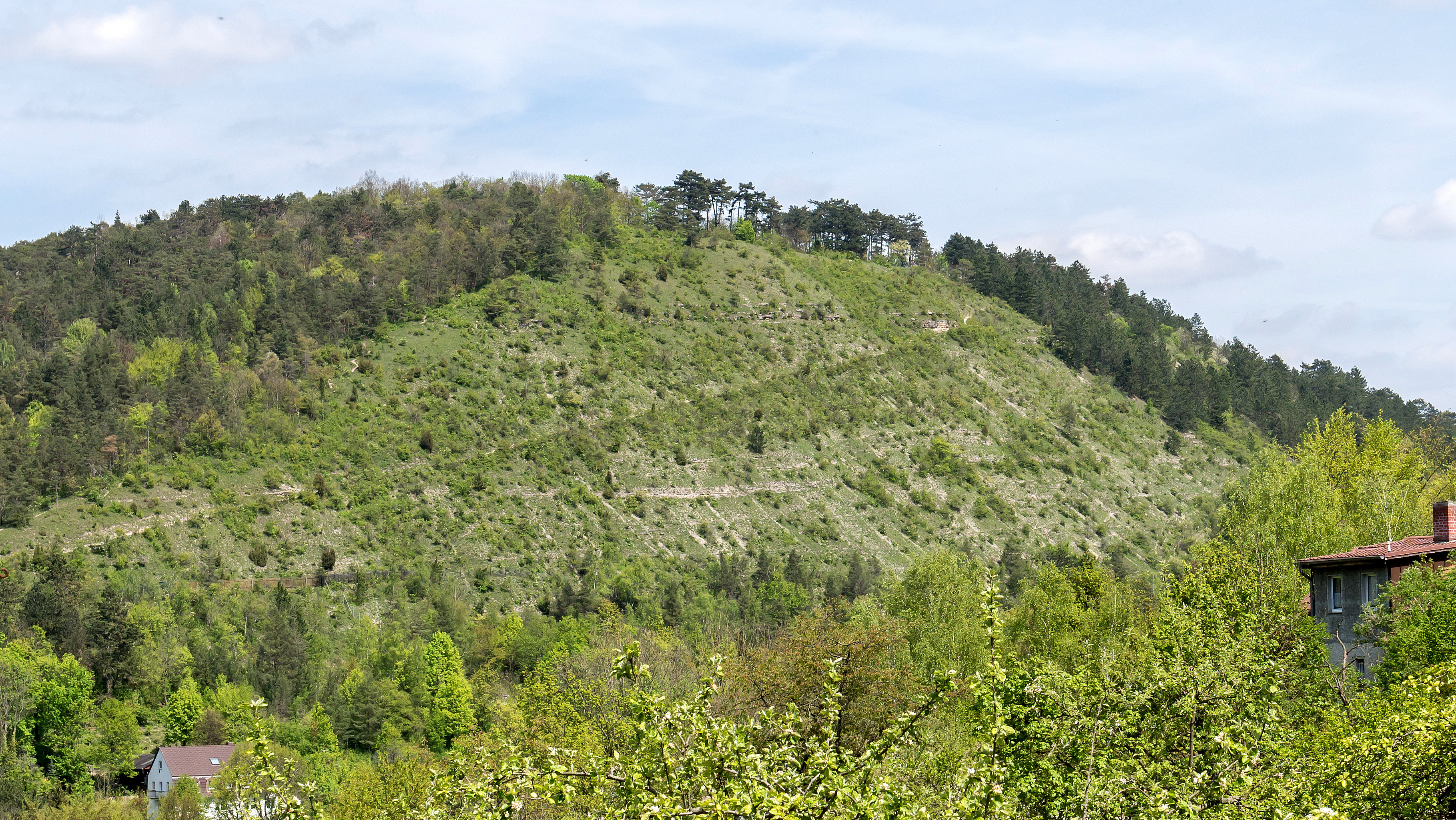 Kalkfelsen an der Sonnenberghorizontalen im FFH-Gebiet DE-5035-302 „Isserstedter Holz-Mühltal-Windknollen“ und Landschaftsschutzgebiet „Mittleres Saaletal“; II